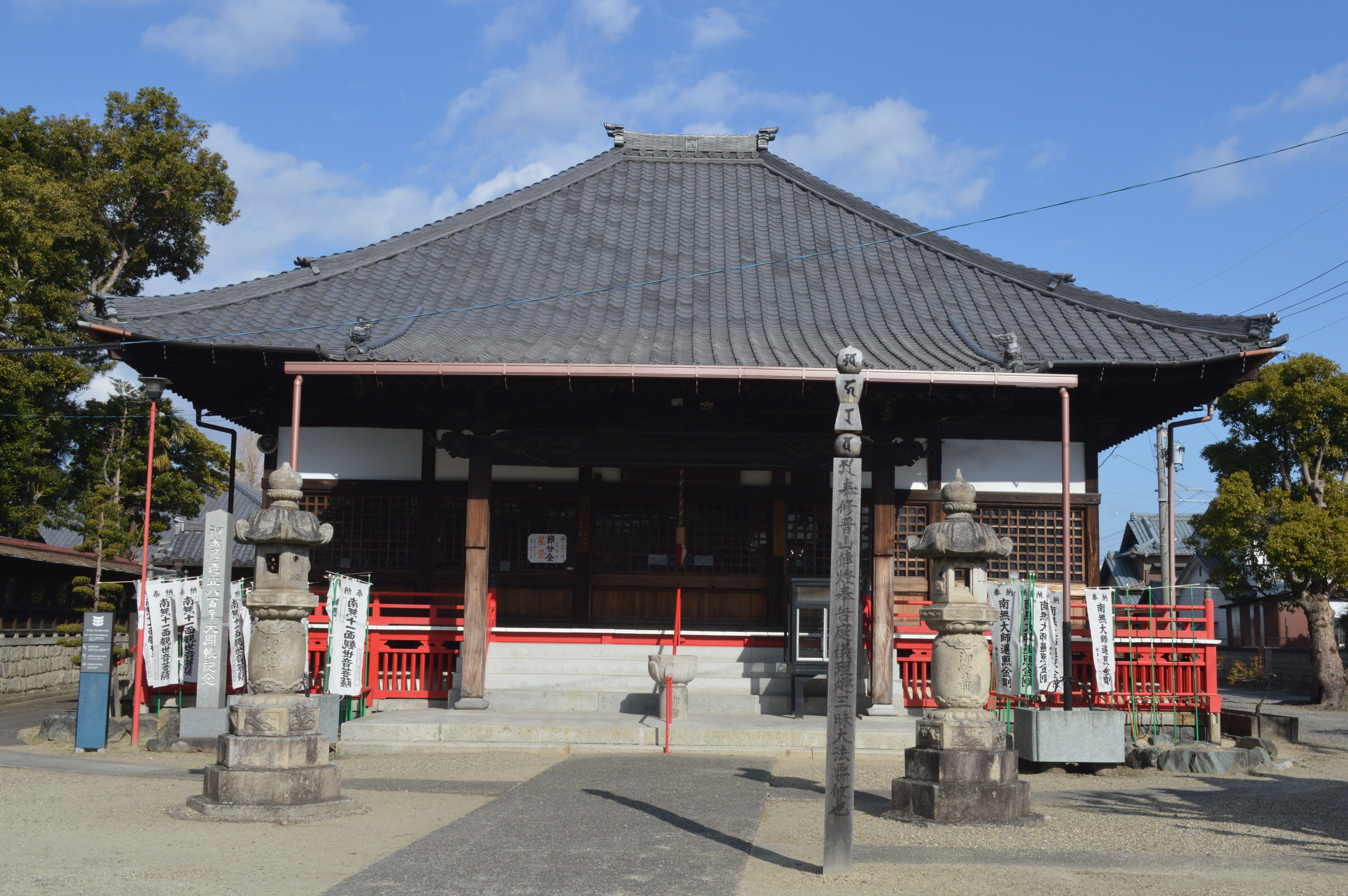 愛知県海部郡蟹江町にある龍照院。